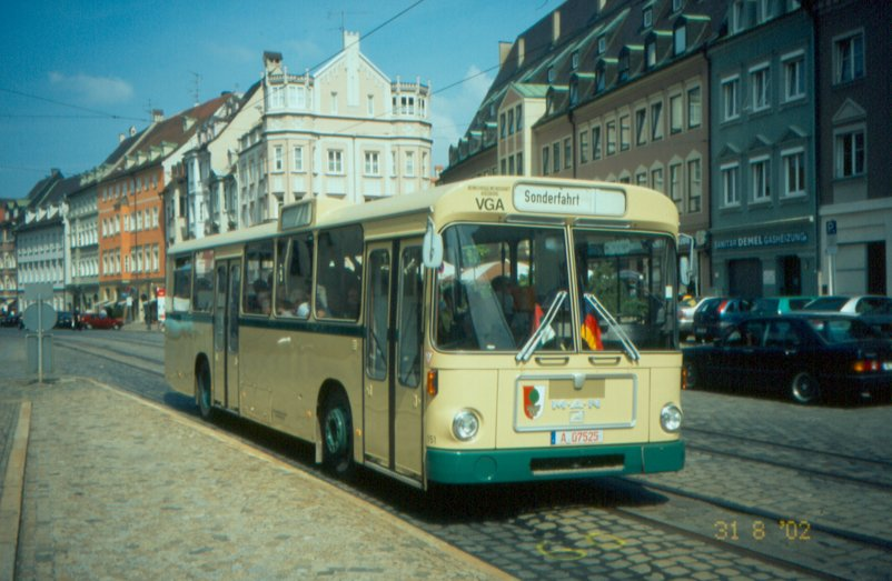 Augsburg Museumsbus 151, MAN SL 192, am Ulrichsplatz